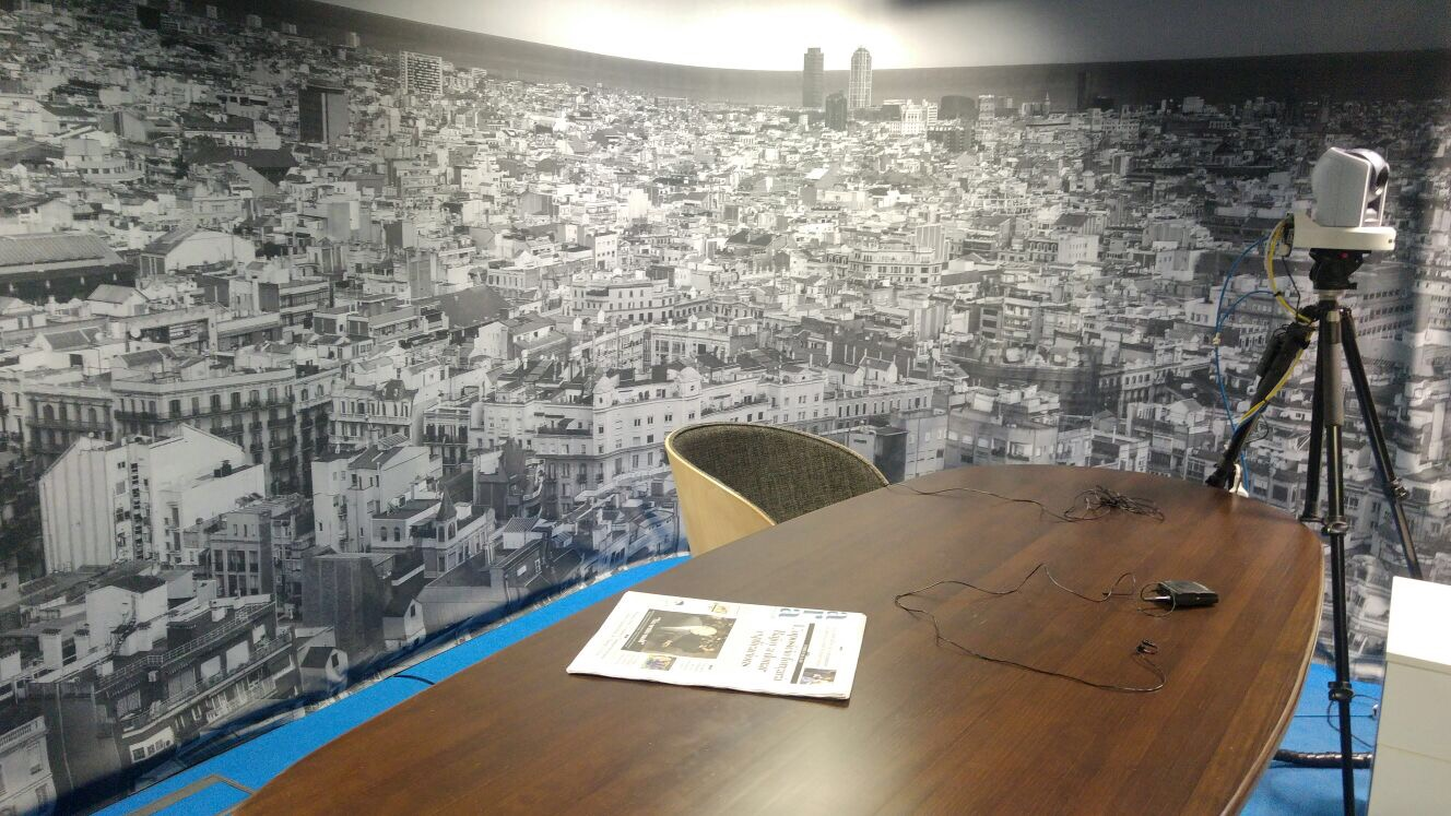 Plató de l'Ara TV